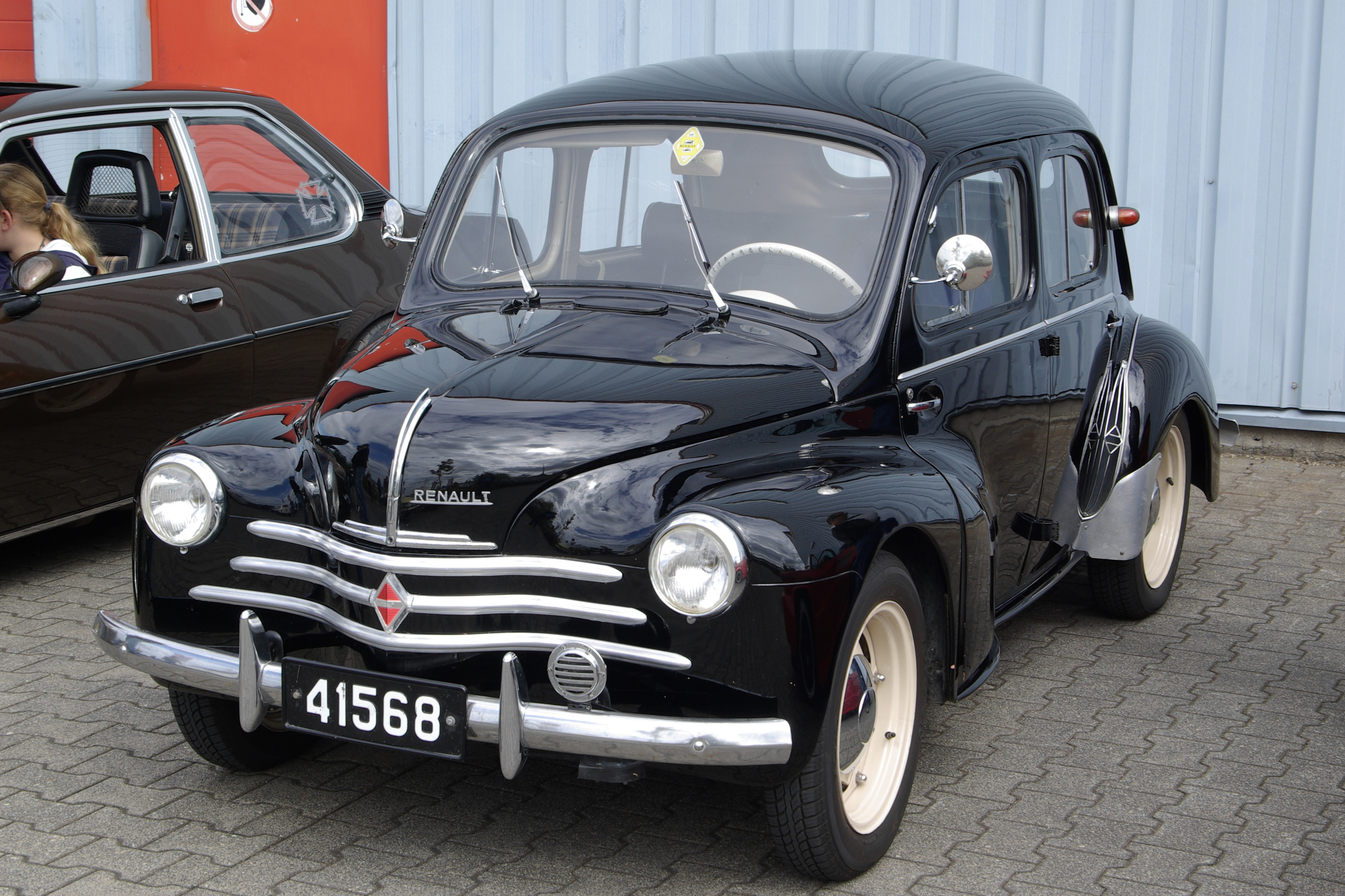 Renault 4 CV, Bitburg Classic 2012